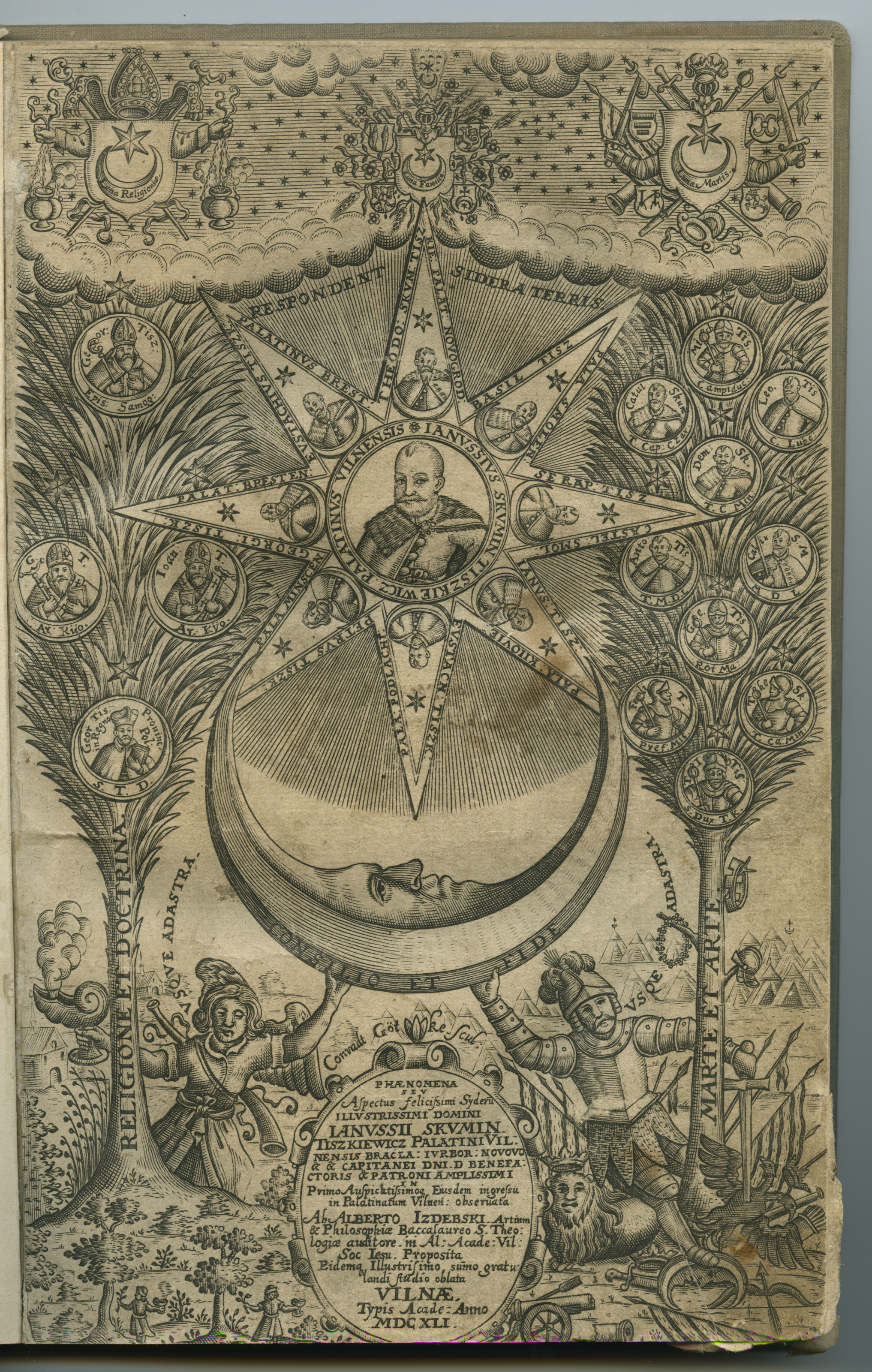 Беларуская (тарашкевіца): Панэгірык Яну Скуміну Тышкевічу (Jan Skumin Tyškievič). Радавод Тышкевічаў (Tyškievičy).